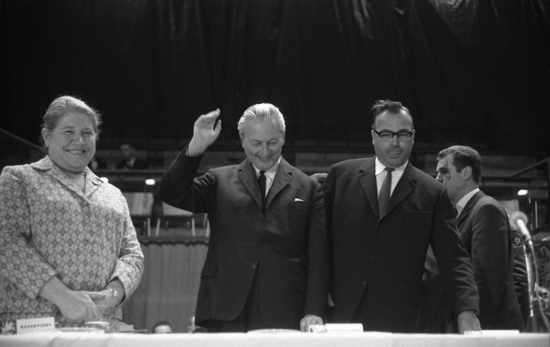 Bundeskanzler Kiesinger bei einer öffentlichen Kundgebung in der Friedrich-Ebert-Halle in Ludwigshafen (Mitte: Kurt Georg Kiesinger, rechts: Helmut Kohl)